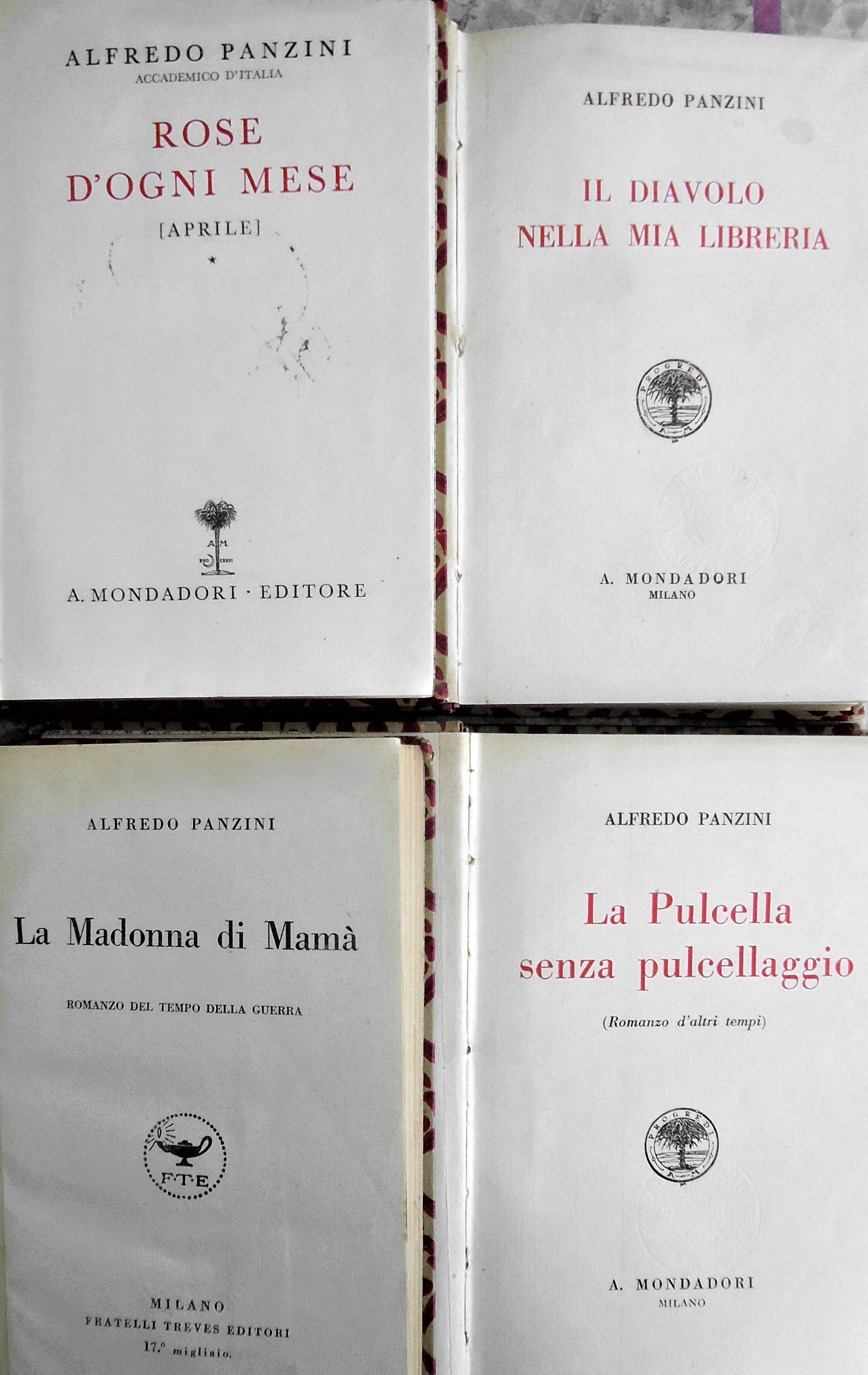 Alfredo Panzini, Rose d'ogni mese ed. 1933, Il diavolo nella mia libreria ed. 1926, La Pulcella senza pulcellaggio ed. 1925, La Madonna di Mamà ed. 1926.